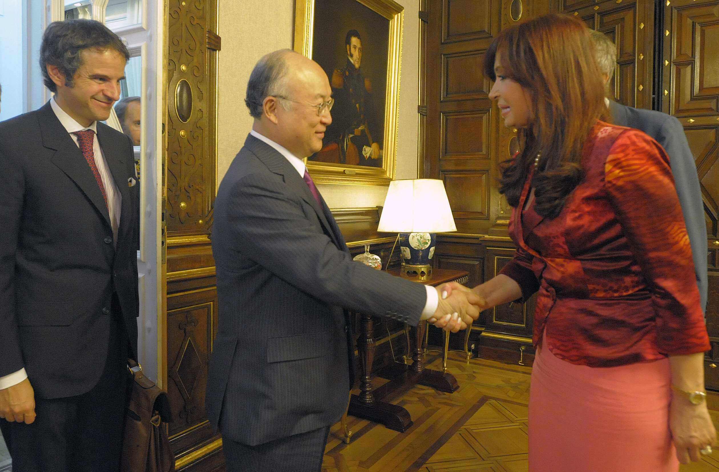 Cristina Fernández de Kirchner, junto a Yukiya Amano, funcionario de la ONU